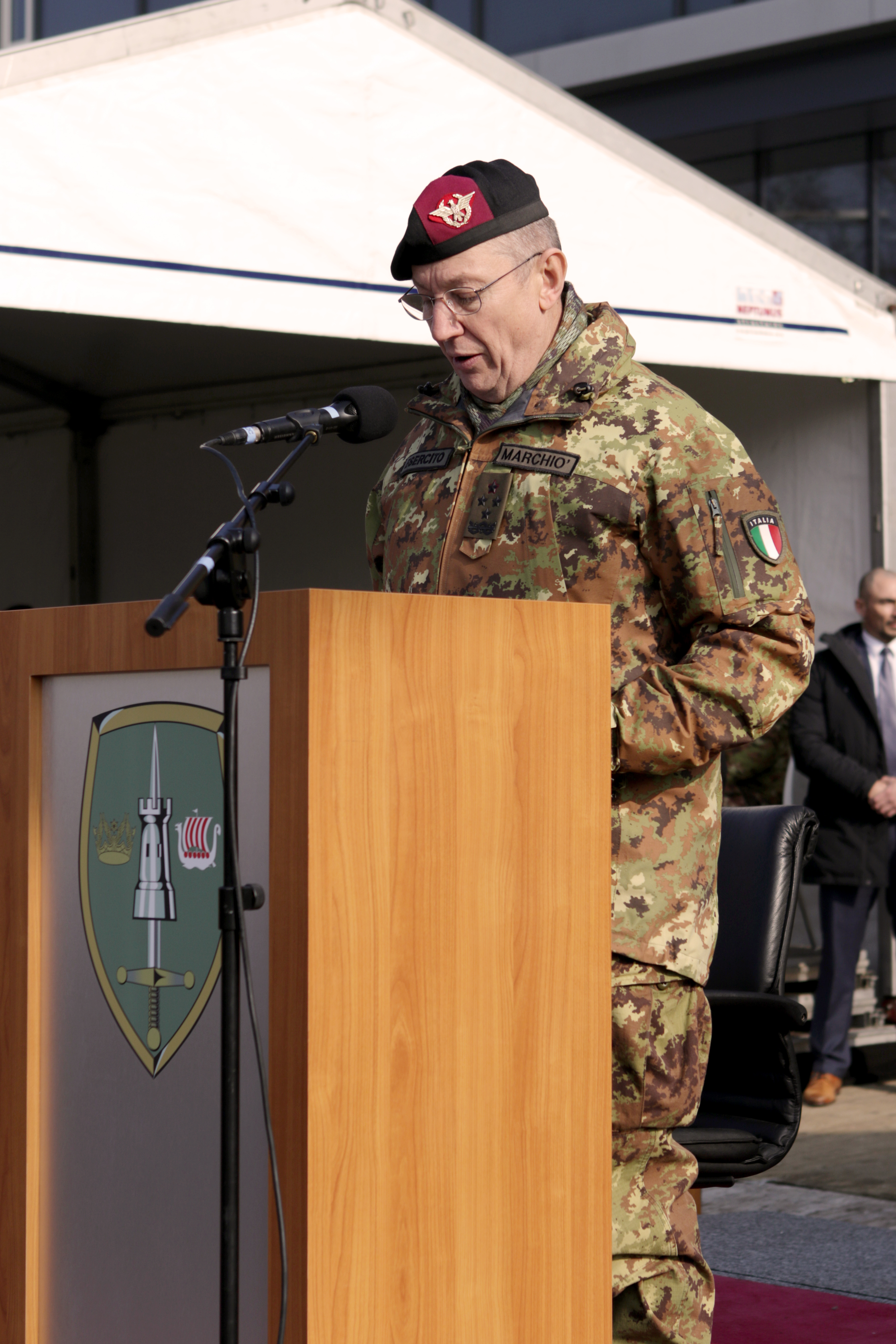 Generale Riccardo Marchiò, Comandante entrante dell'Allied Joint Force Command Brunssum durante la cerimonia di cambio del comando